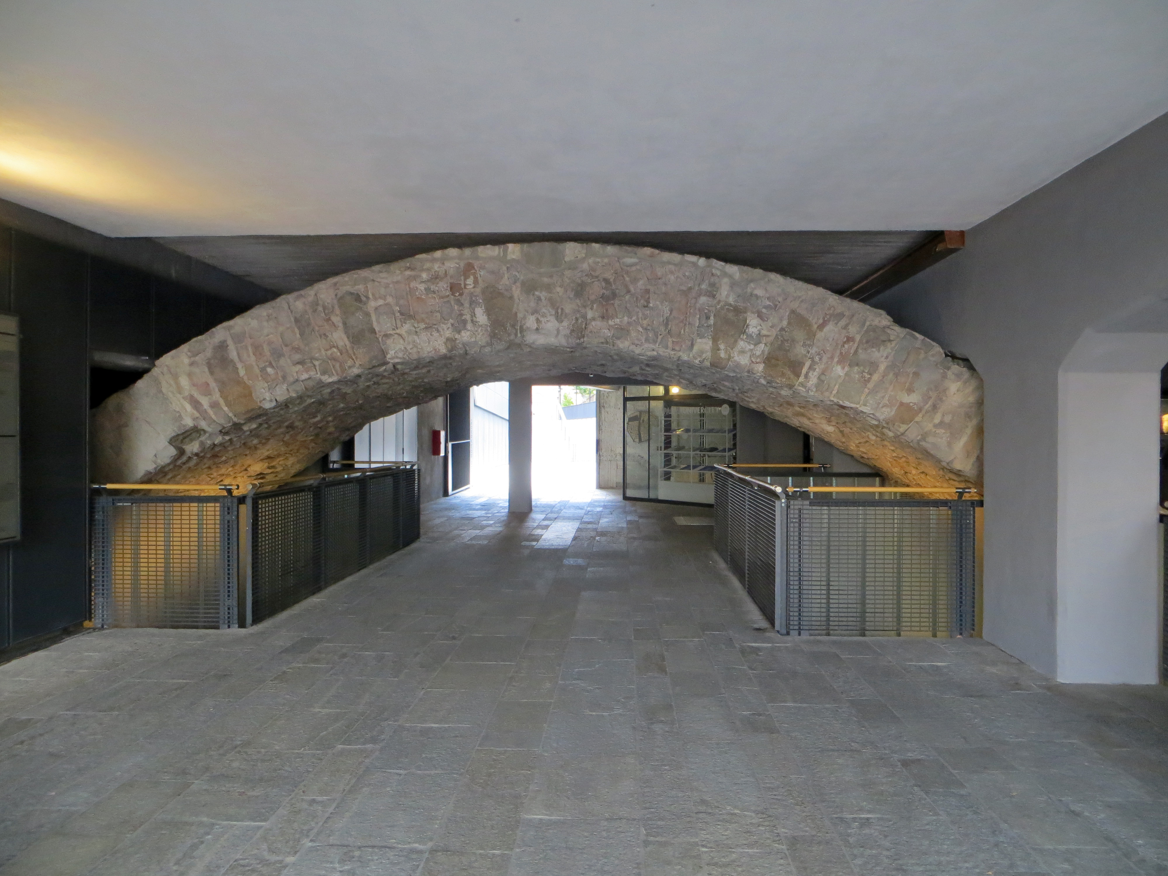 Pons Lapidis (Parma)